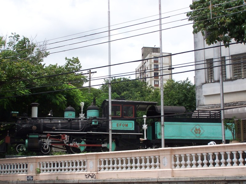 Locomotiva da E.F.O.M em Belo Horizonte - MG, Brasil.